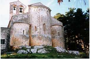 Basilica di Santa Maria Assunta